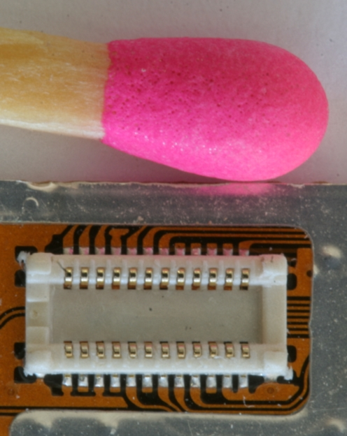 Feinpoliger Stecker im Vergleich zu einem Streichholz